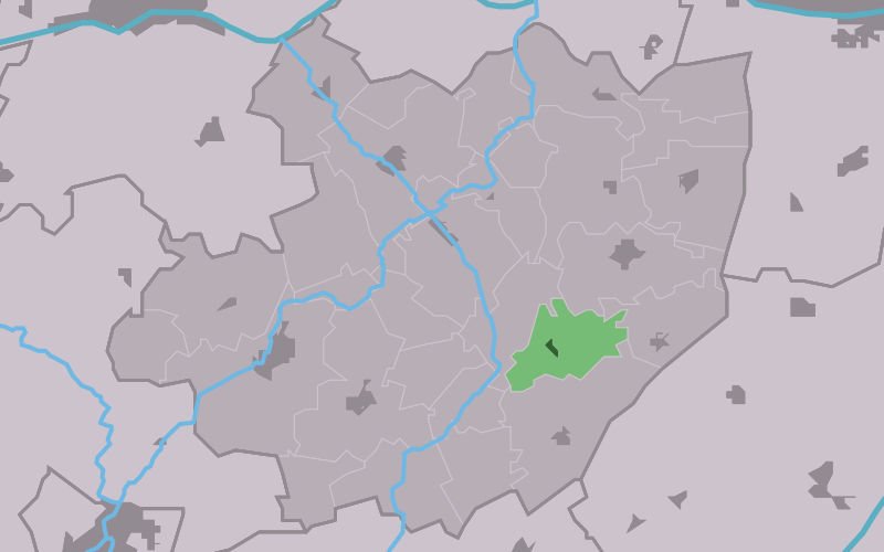 Kaartsje fan himrik fan Wiuwert